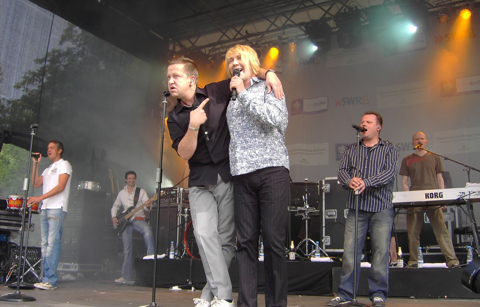 Die Prinzen bei einem Konzert in Biberach an der Riß am 20. Juni 2006. Zur Verfügung gestellt von weberberg.de, der Website für Biberach. Links in weißem T-Shirt Jens Sembdner, vorne in schwarzem Hemd Sebastian Krumbiegel.